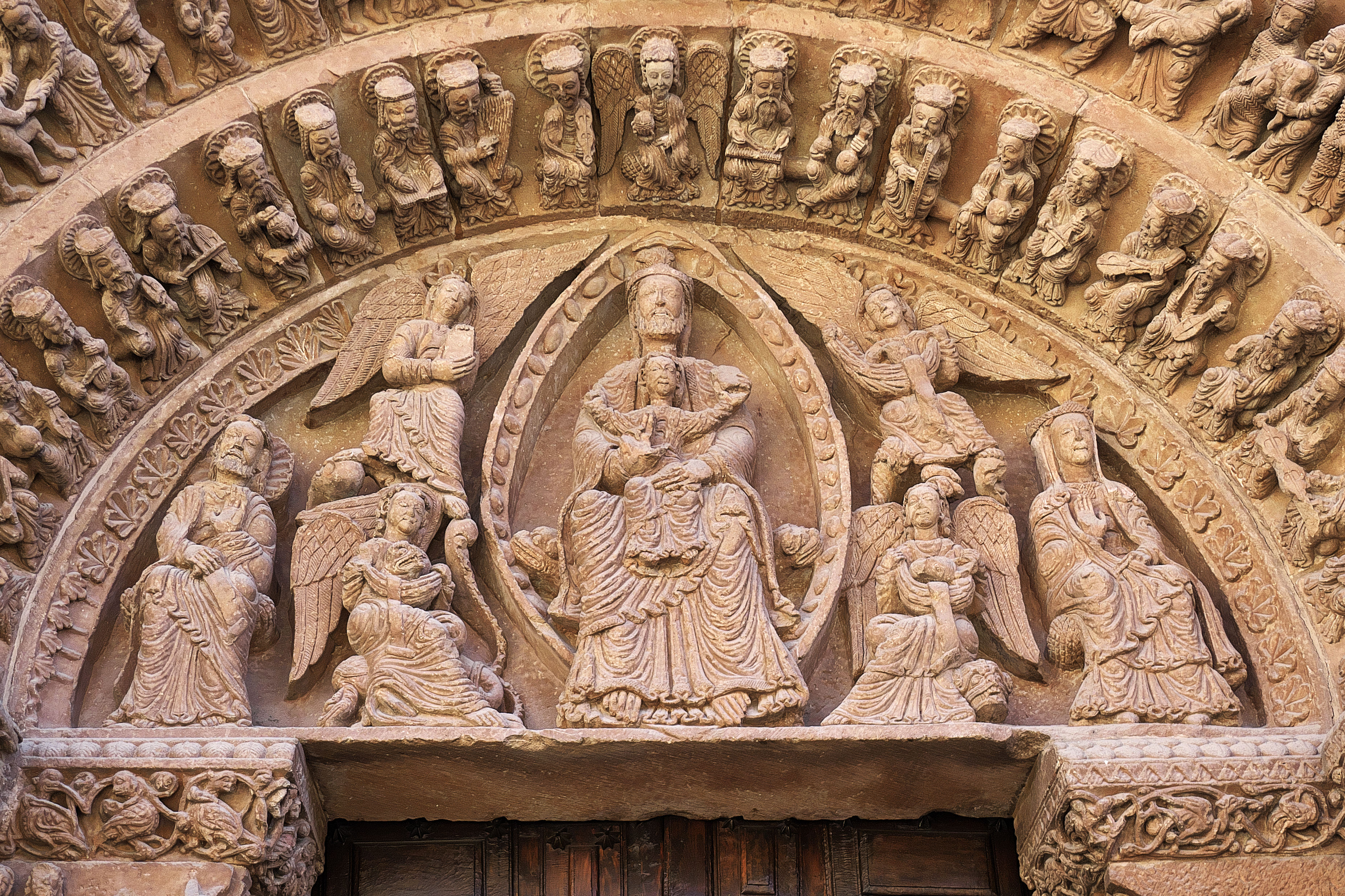 Iglesia de Santo Domingo (Soria). Segunda mitad del siglo XII. Entre los tímpanos destacados del arte tardorrománico europeo. Junto con el de la Iglesia de San Nicolás (Tudela), presenta, como mensaje central, la novedad iconográfica de la Trinidad Paternitas, representación trinitaria desarrollada en el Árbol de Jesé del claustro de Silos y en el parteluz central del Maestro Mateo en el Pórtico de la Gloria. El Tetramorfos, realza la figura de los ángeles, los cuatro Vivientes, portadores de los símbolos de los evangelistas, relieves con un movimiento de alta calidad artística. Las dos figuras laterales refuerzan la simetría del conjunto. Sin documentación sobre el patrocinio, ni sobre los artífices.